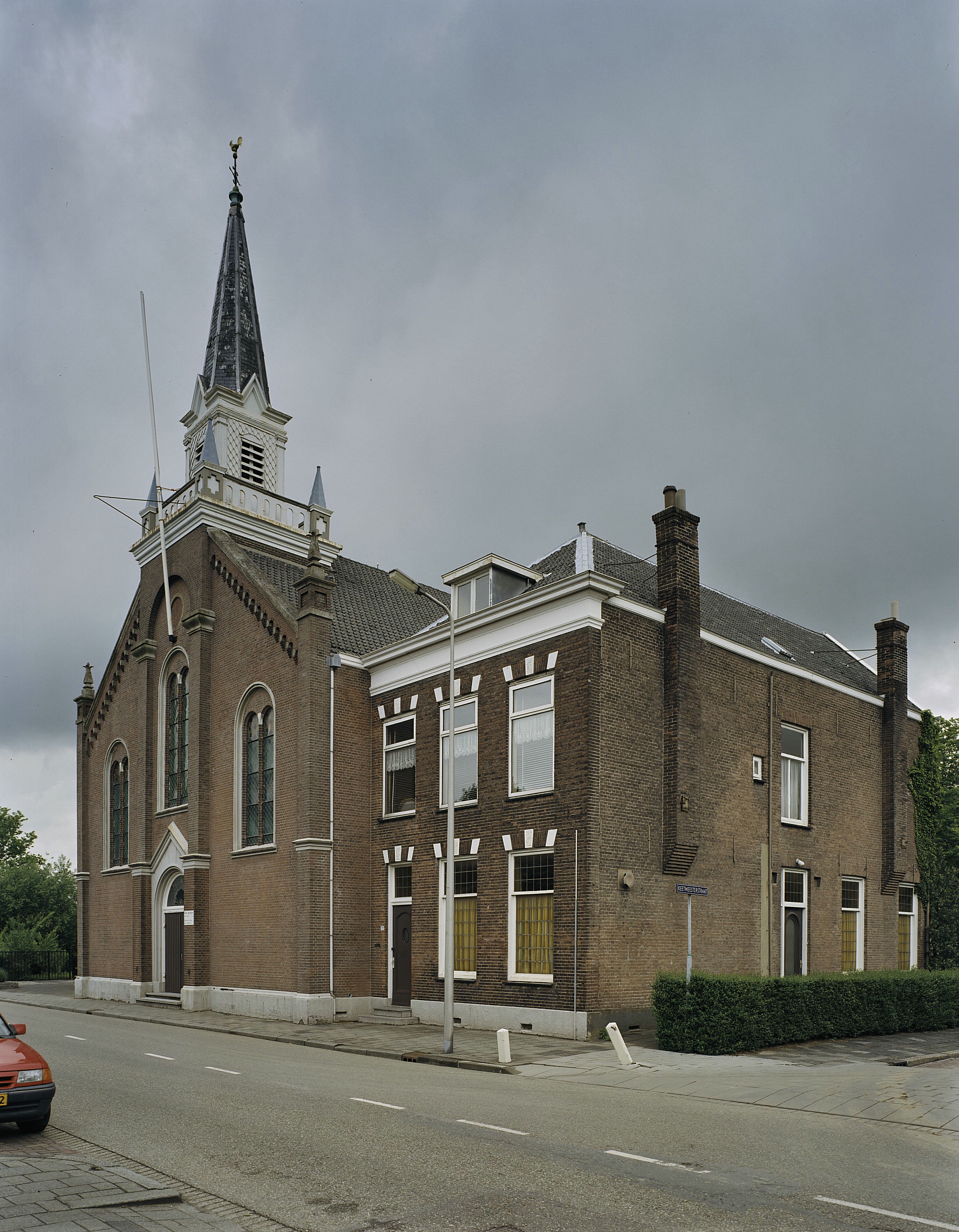 Pastorie: Pastorie, overzicht voorgevel en rechter zijgevel (opmerking: Gefotografeerd voor Monumenten In Nederland Zuid-Holland)